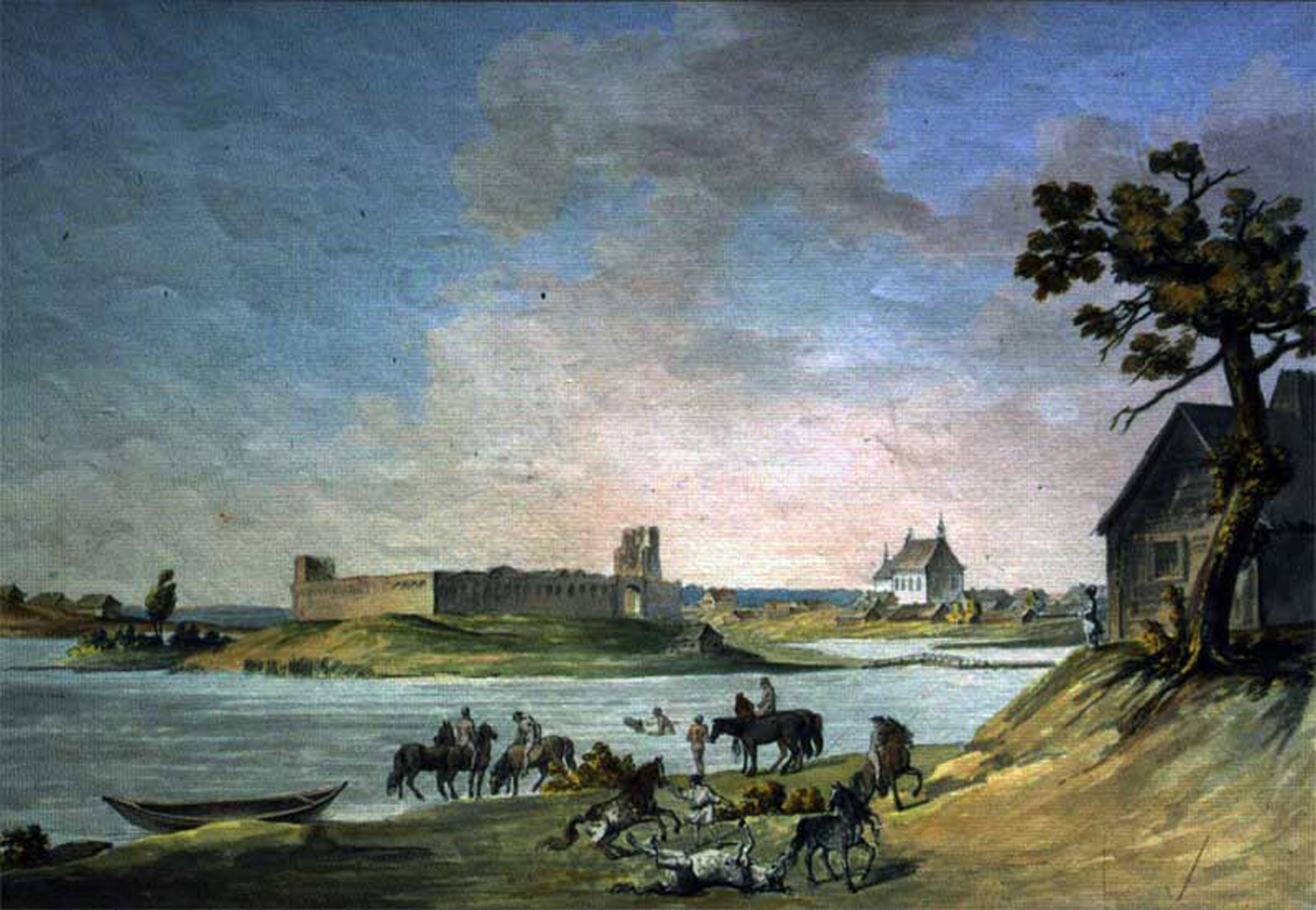 Выгляд Лідскага замка на пачатку ХІХ ст Беларуская (тарашкевіца): Ліда (Lida), панарама места і замка